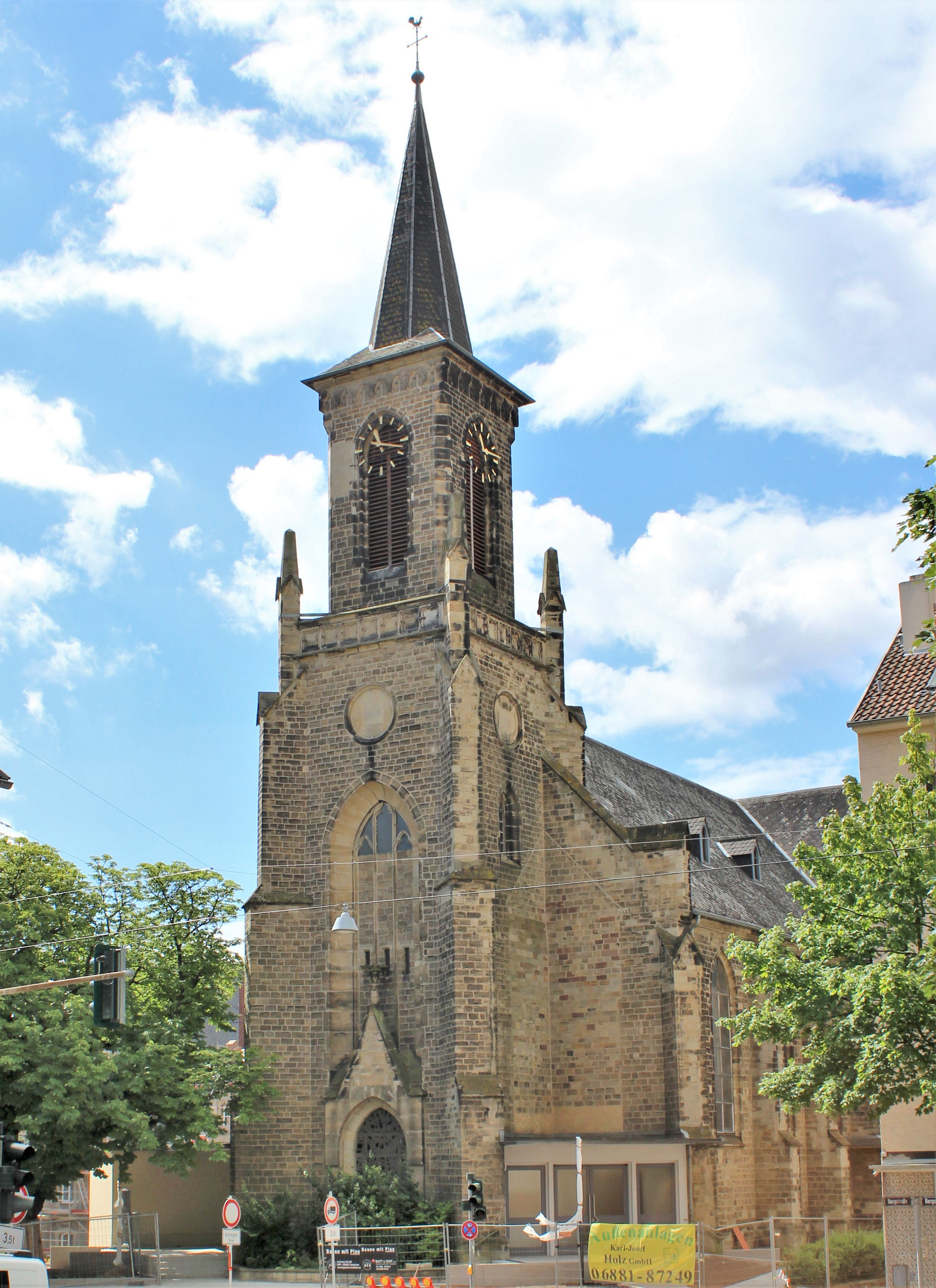 Kath. Kirche St. Eligius. Saarbrücken-Burbach, Saarland